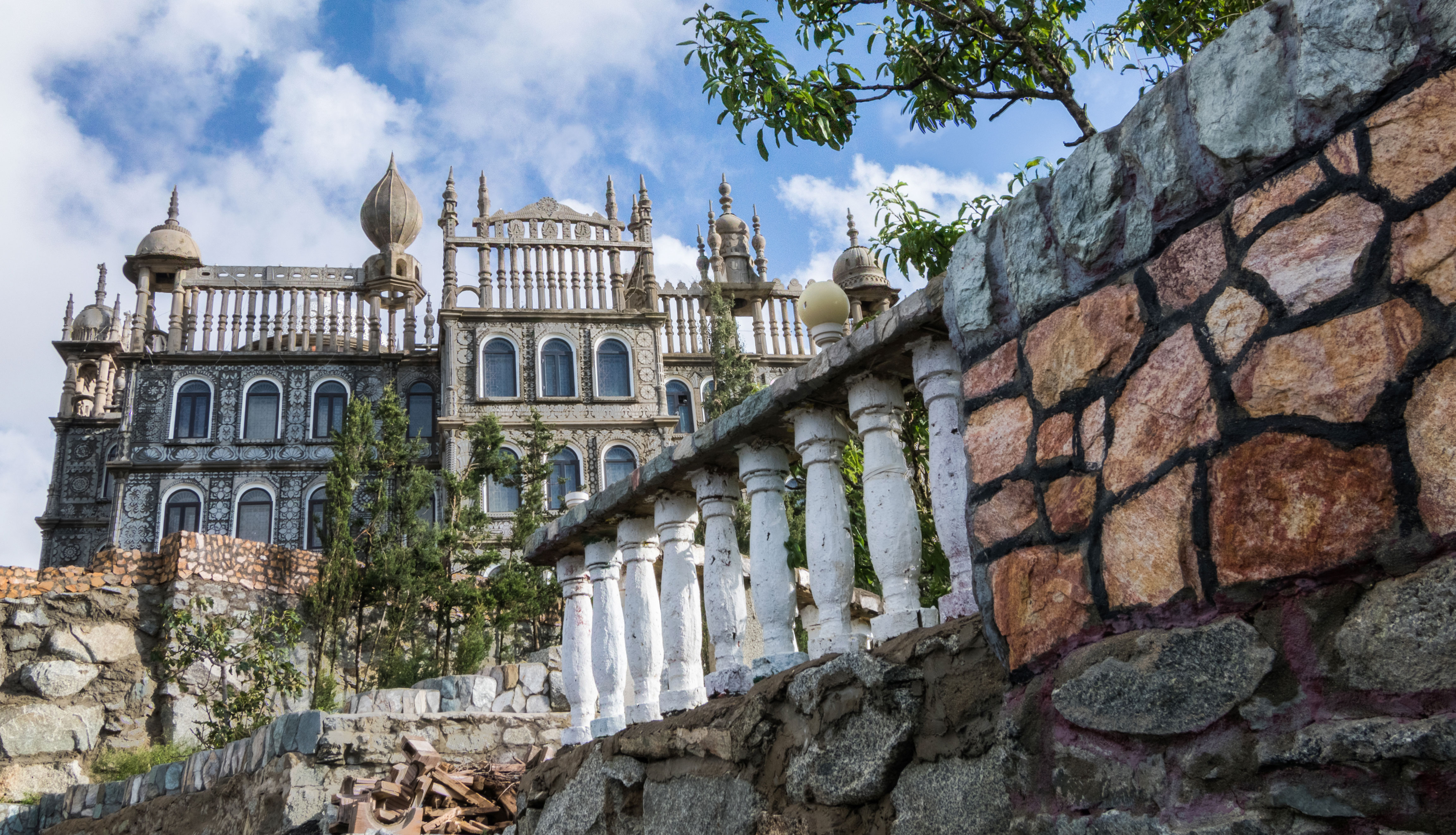 قصر المقر الأثري بالنماص